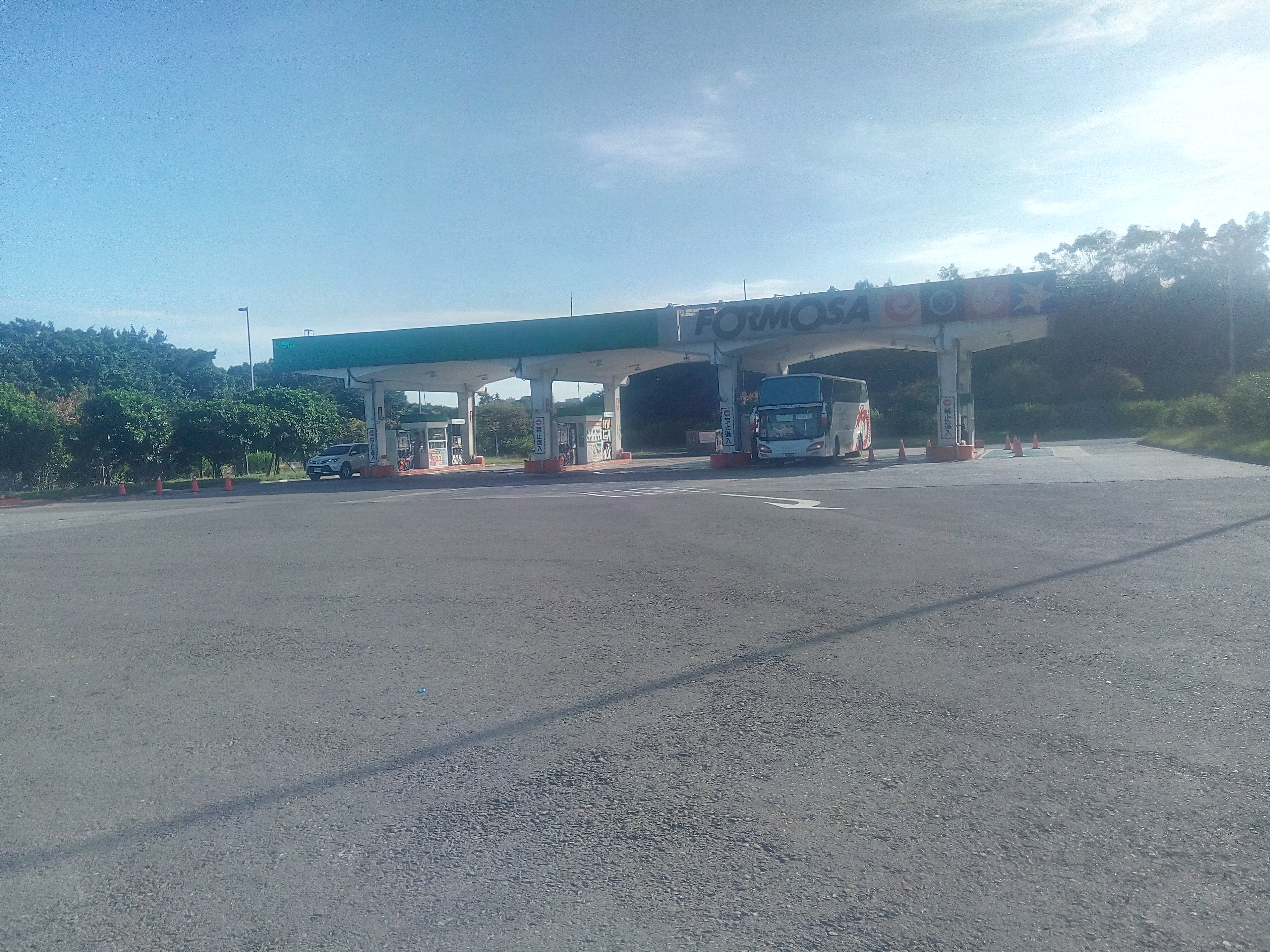 中文（台灣）: 湖口休息區，台亞石油湖口北上站?湖口南下站?。